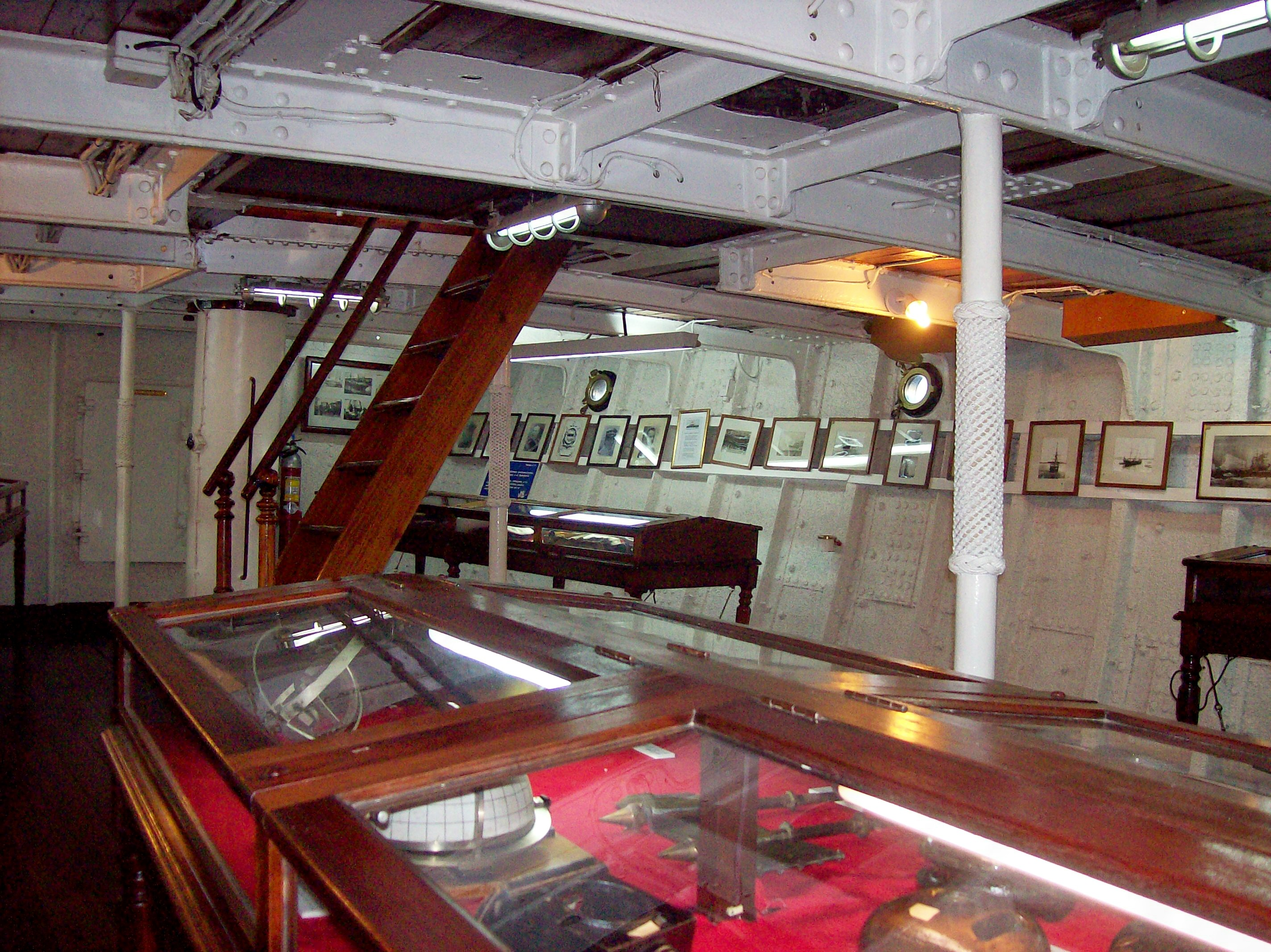 Buque Museo Corbeta A.R.A. Uruguay en puerto Madero, Buenos Aires. Vista interior del Museo Naval.